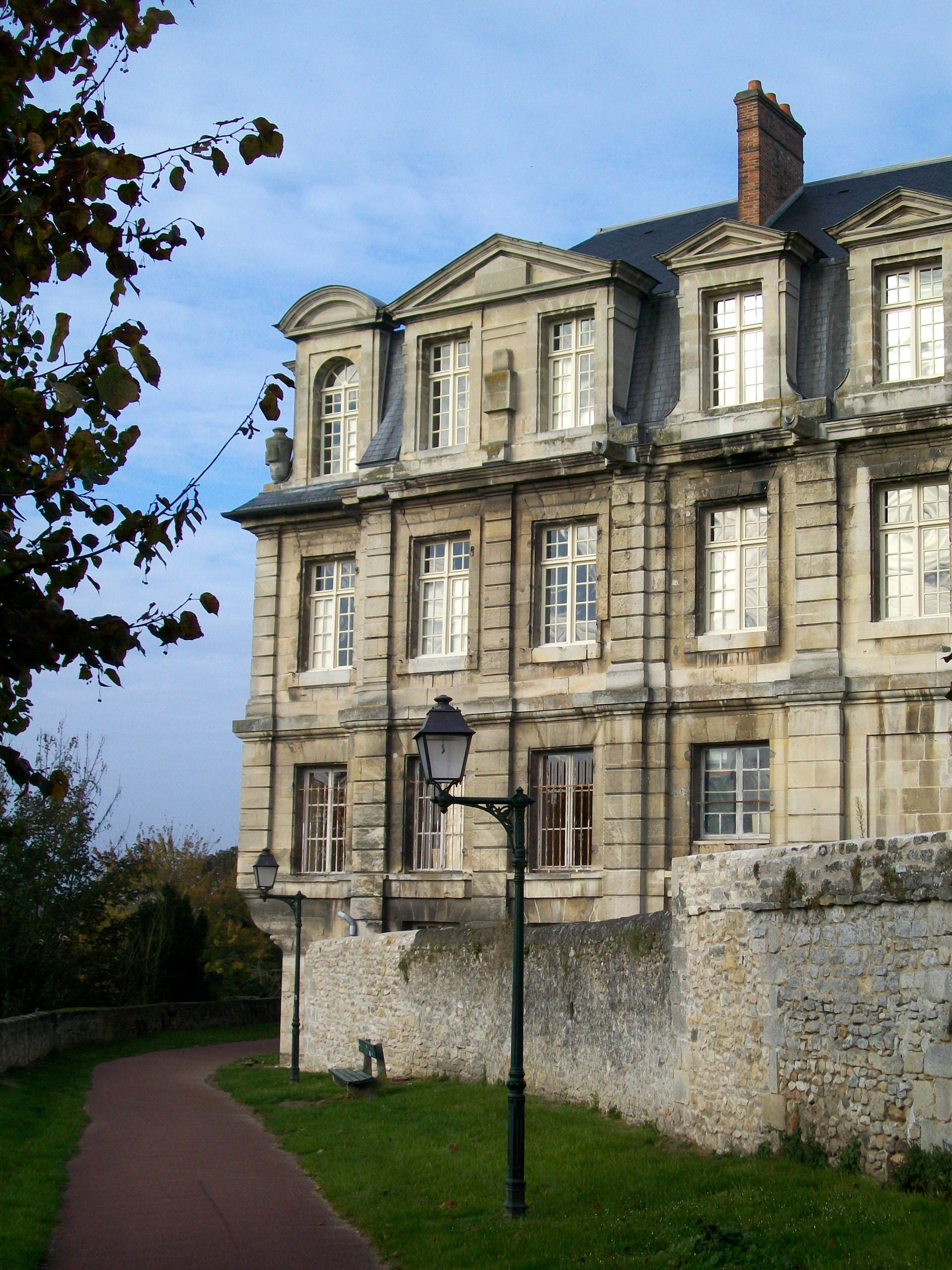 Ancienne abbaye St-Vincent, vue depuis la promenade des remparts.